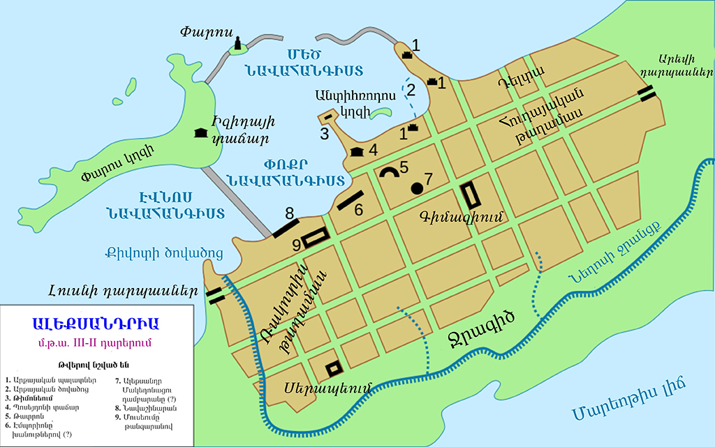 Ալեքսանդրիայի հատակագիծը Պտղոմեոսների դարաշրջանում